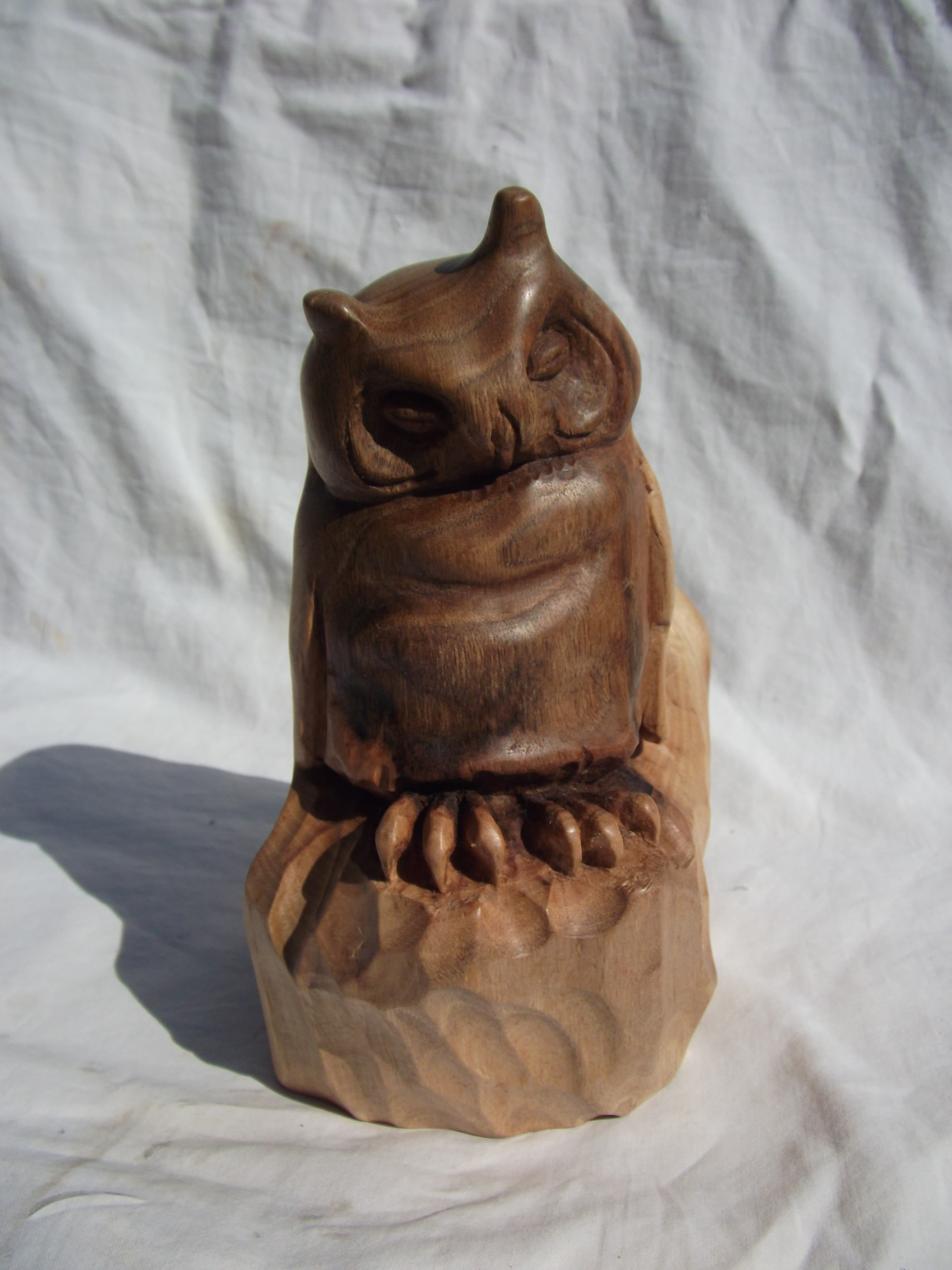 sculpture de hibou